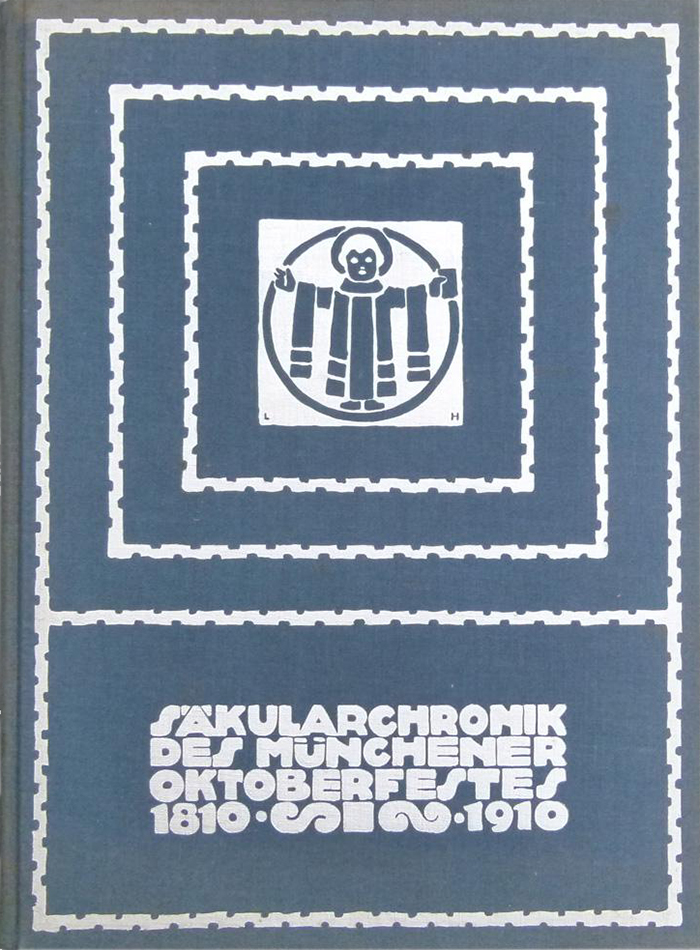 Vorderseite des Buches Ernst von Destouches Saekularchronik 100 Jahre Oktoberfest-1810-1910